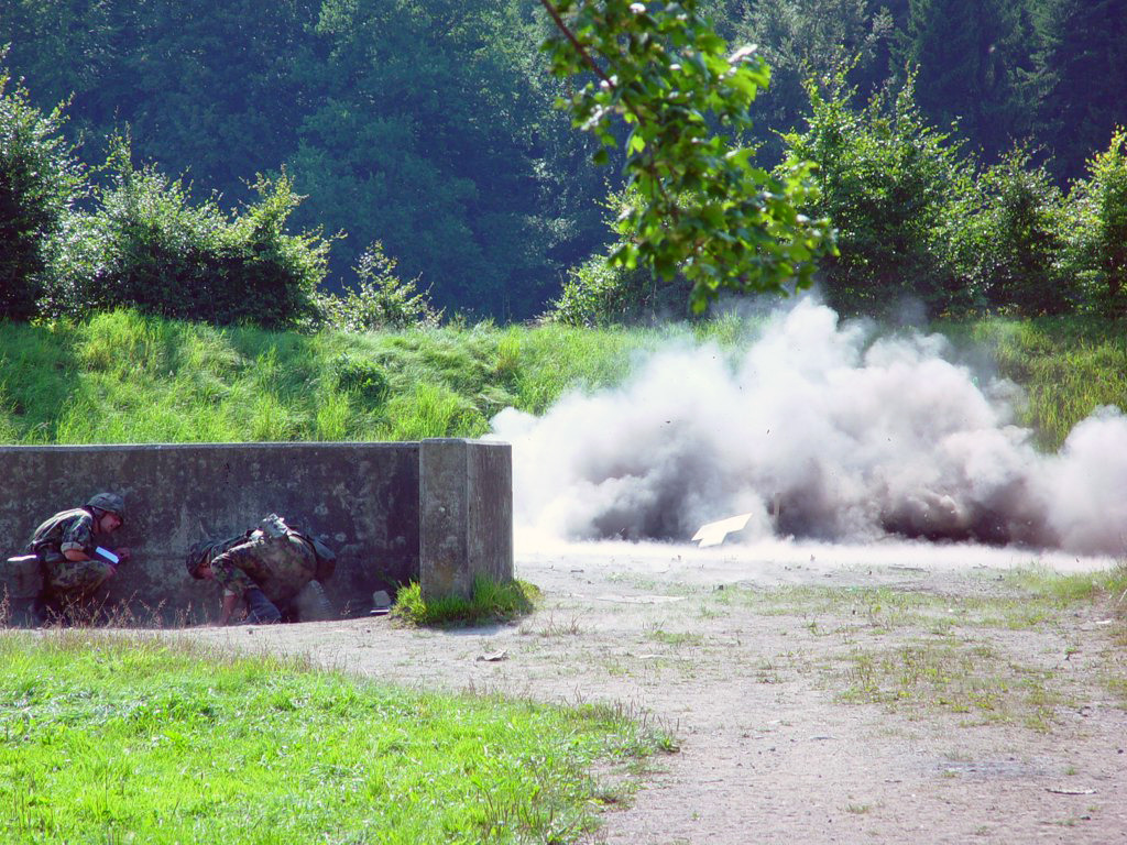 erster schulmässiger Wurf eines Rekruten mit EUHG 85